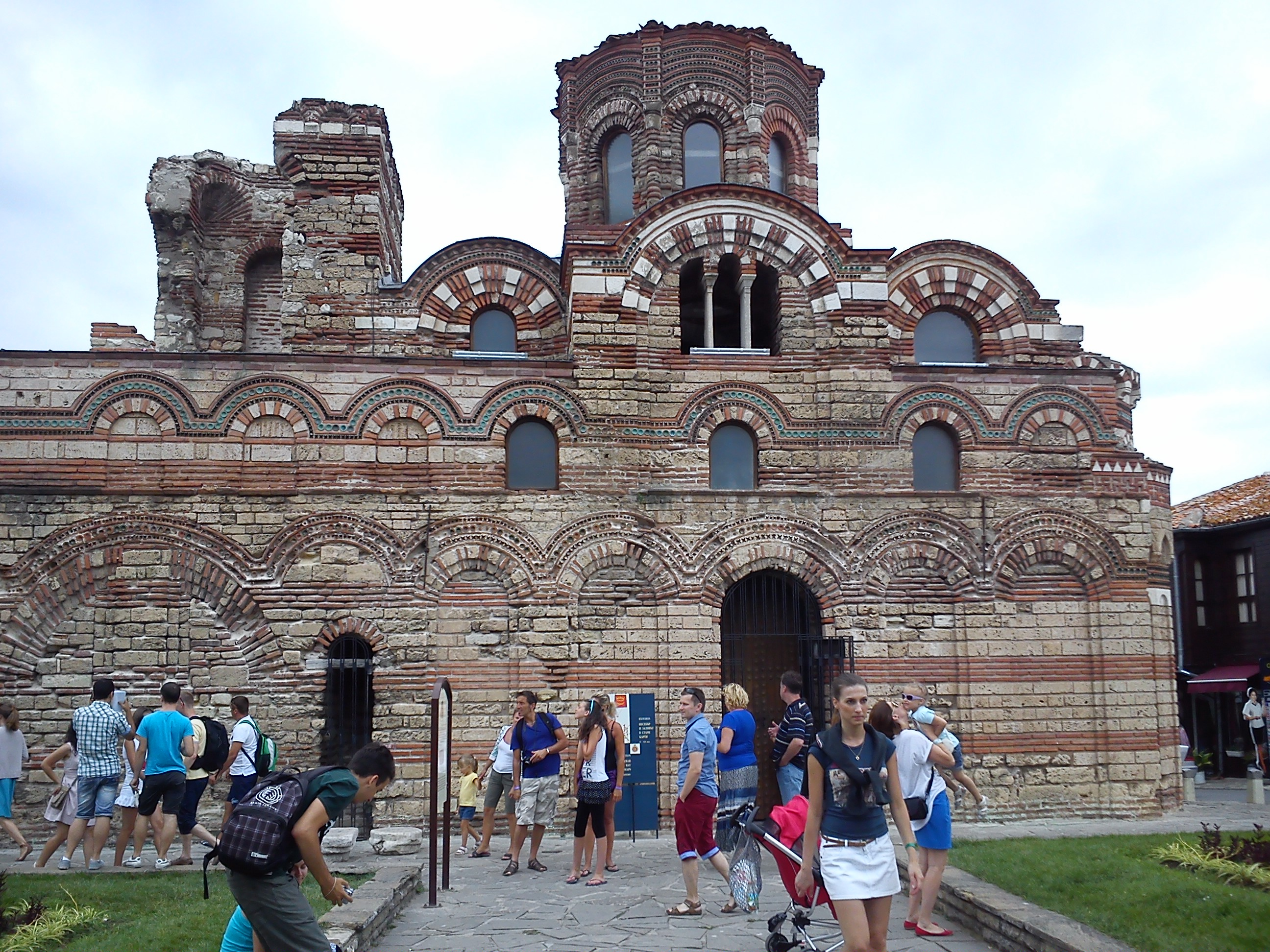 Bułgaria, Nesebyr, Cerkiew Chrystusa Pankratora